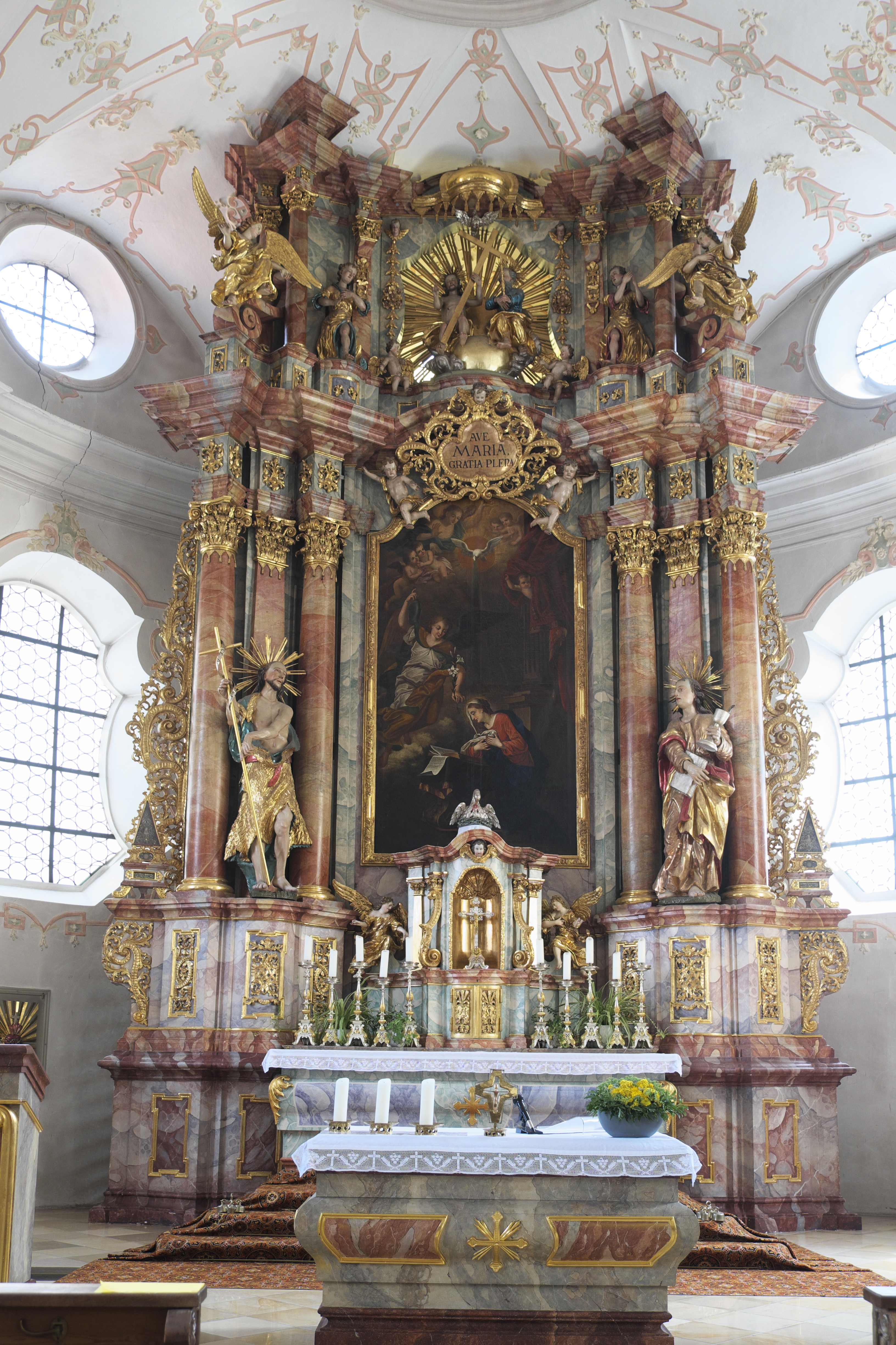 Katholische Pfarrkirche St. Johann Baptist in Riedenburg im niederbayerischen Landkreis Kelheim (Bayern/Deutschland), Hochaltar